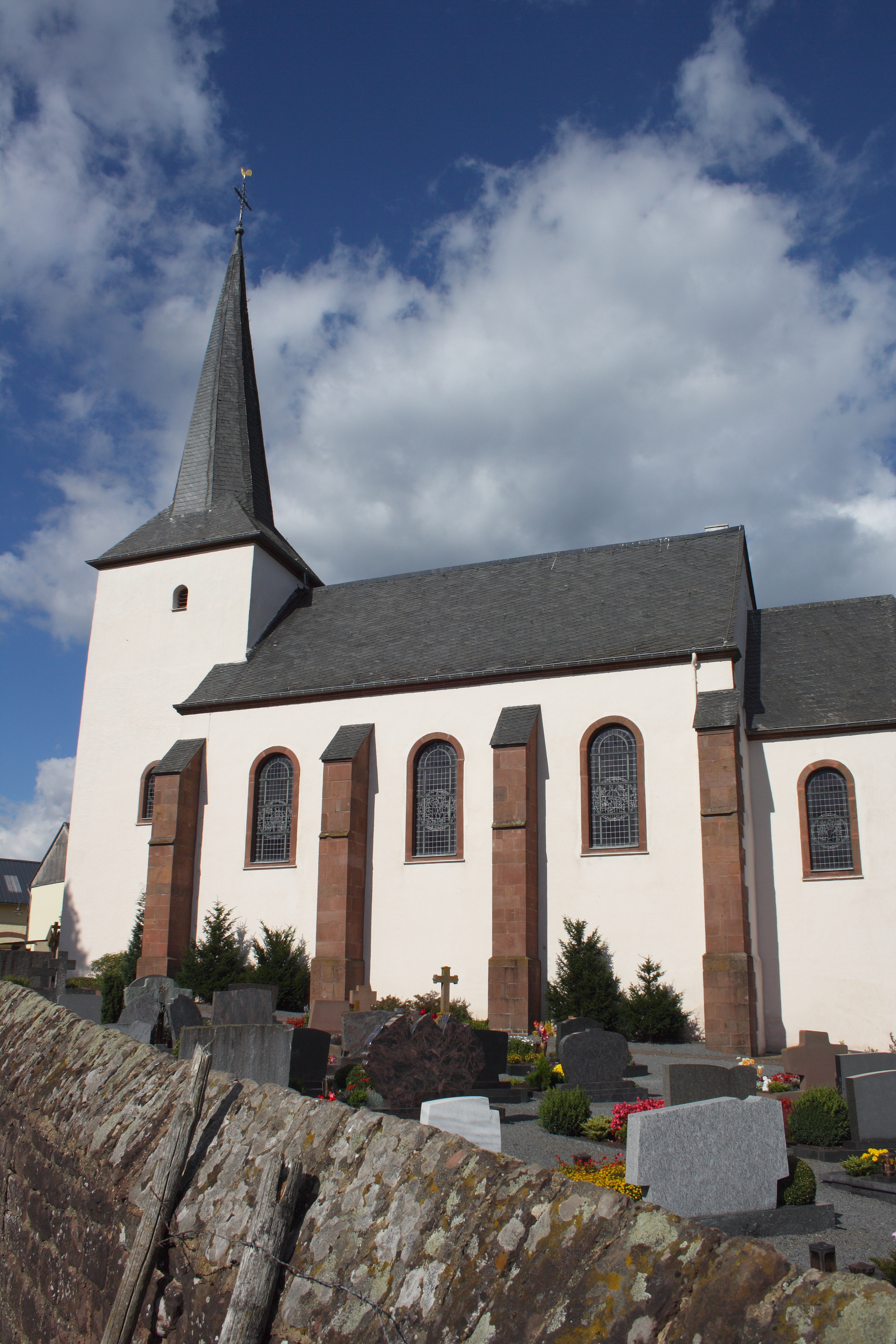 katholische Pfarrkirche St. Dionysius in Seinsfeld im Eifelkreis Bitburg-Prüm (Rheinland-Pfalz)